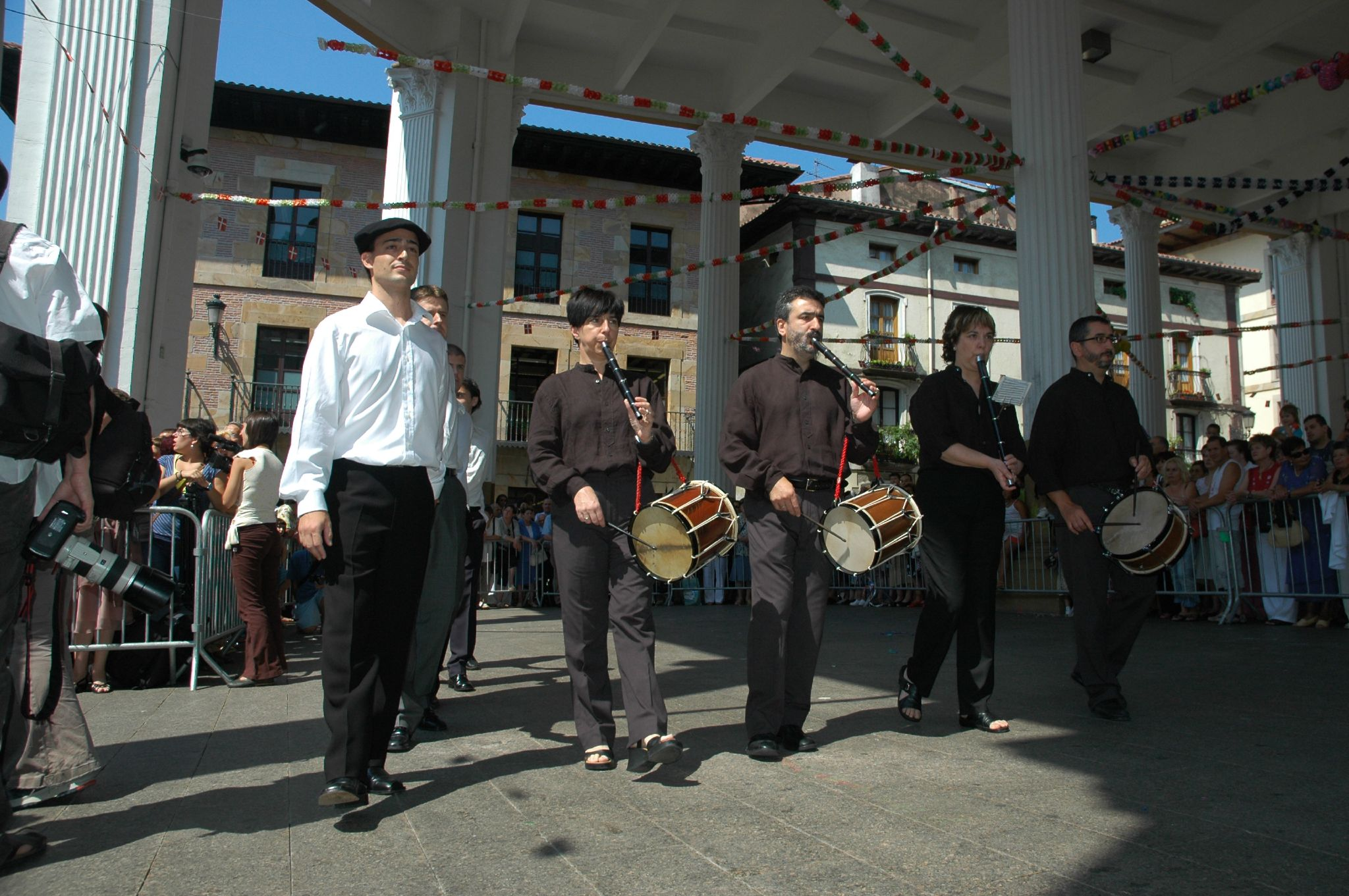 Ordiziako Santanazaleen esku-dantza, 2007.